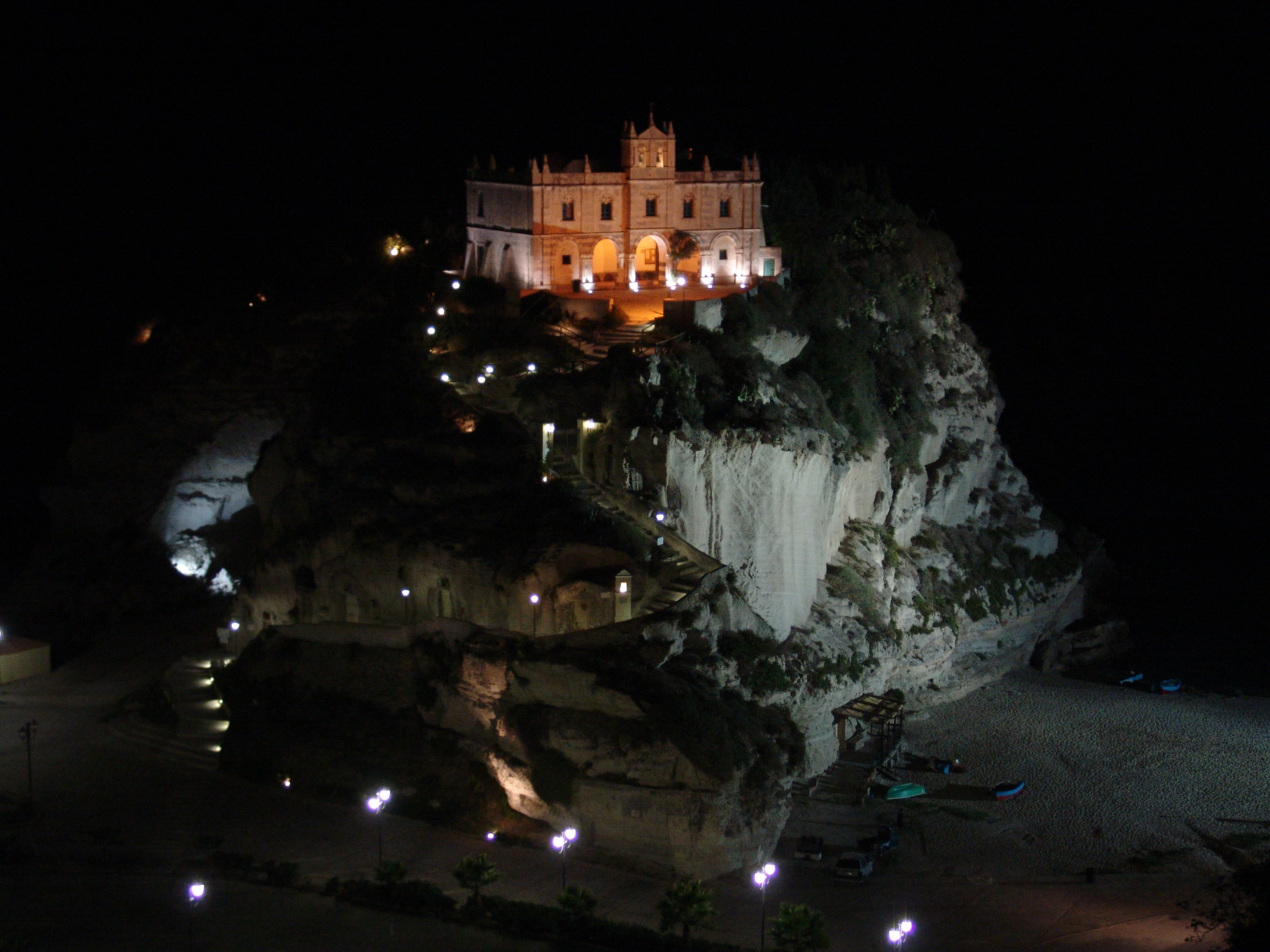 Santa Maria Dell'Isola